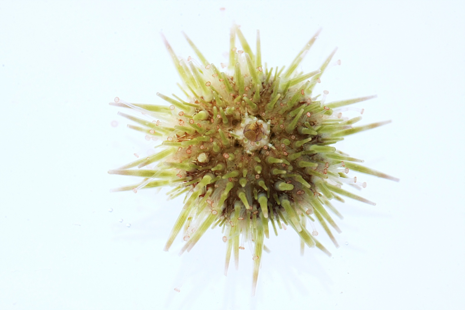 Paracentrotus lividus. Intertidal Zone. Les Sables d'Olonne, France.